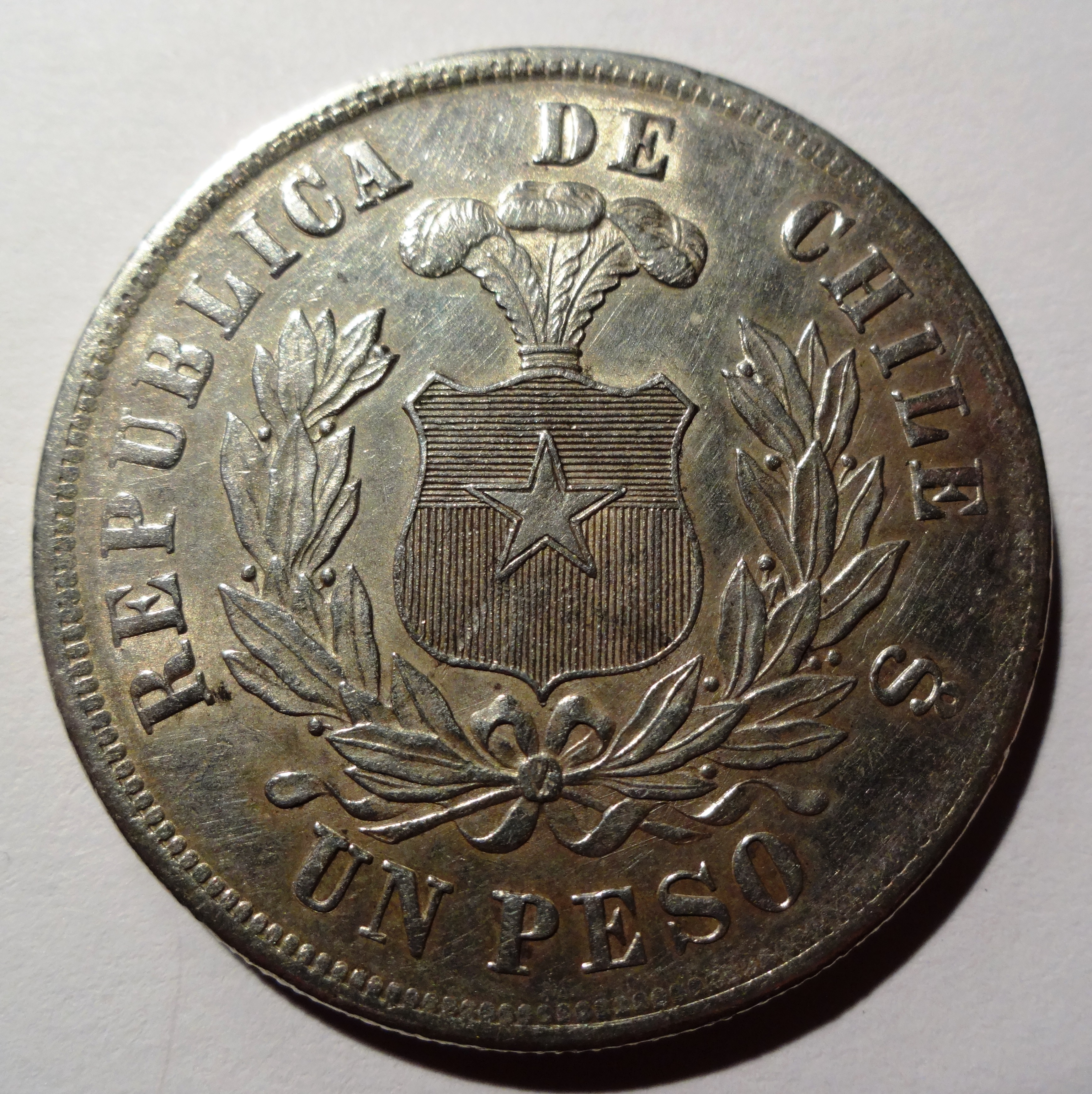 Chilenischer Peso von 1886, Vorderseite